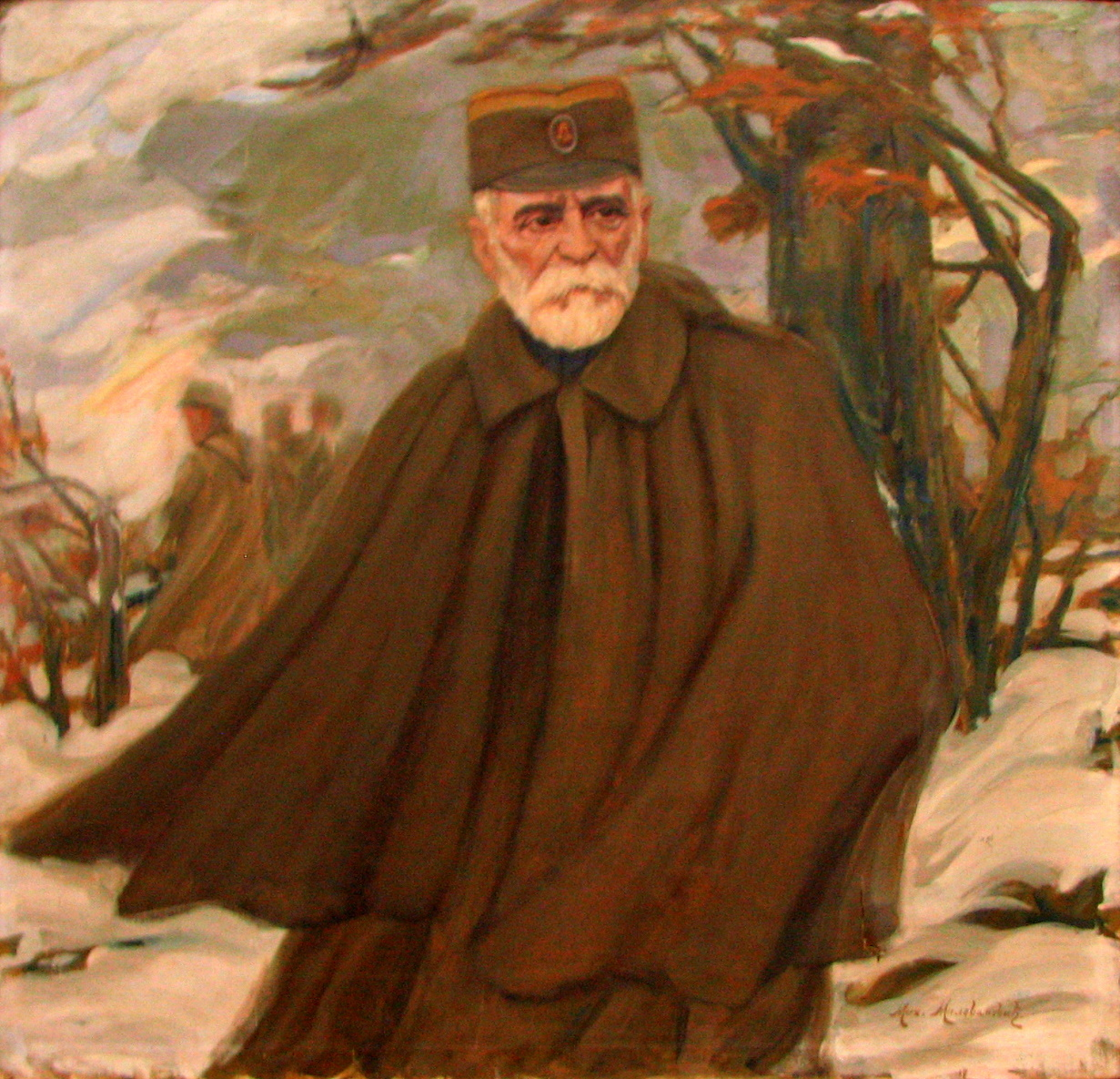 Слика: Портрет војводе Радомира Путника Аутор: Михаило Миловановић (1879-1941) Фотографисао: Бранко Д. Тодоровић